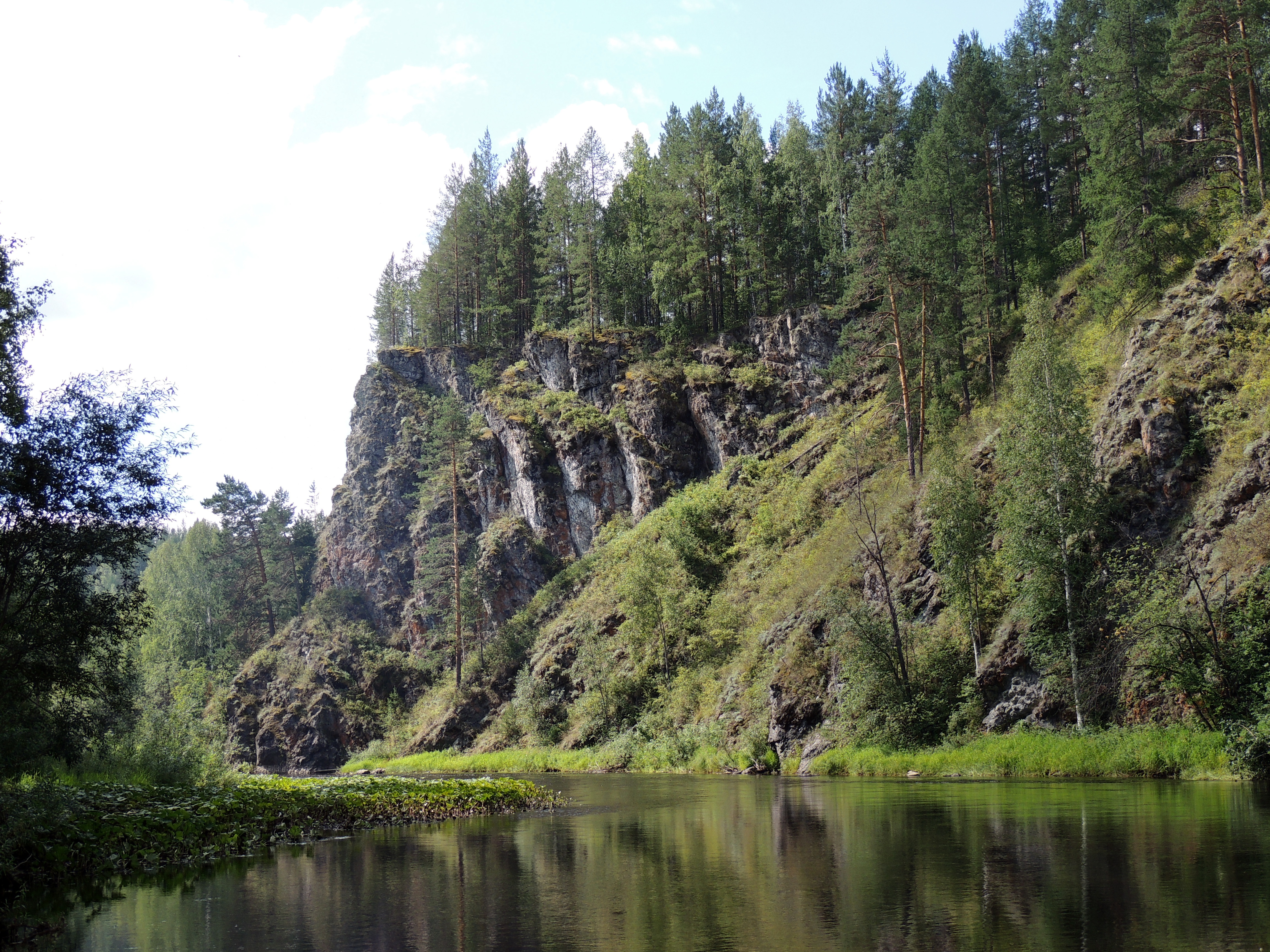 река Каква, Свердловская область